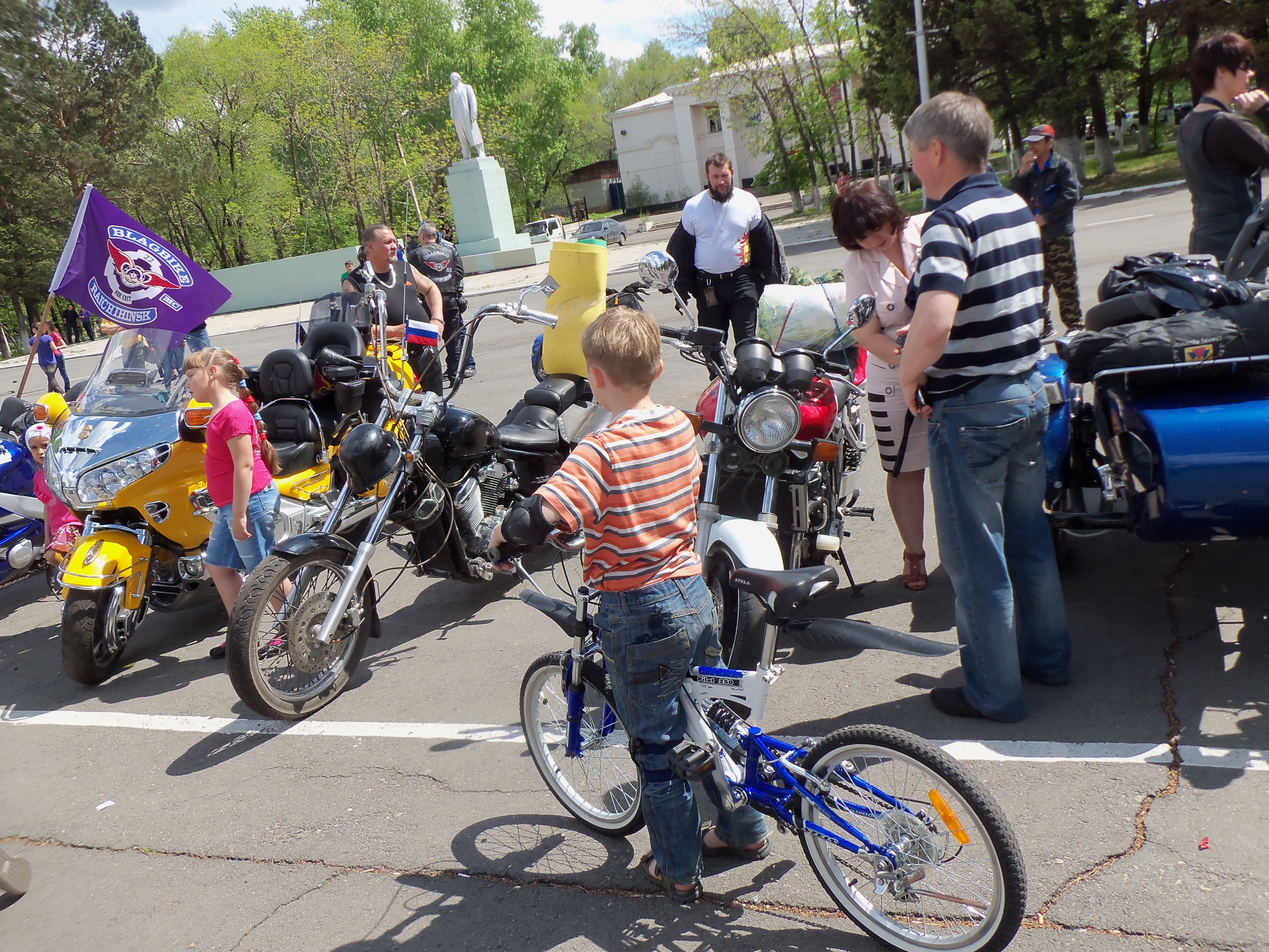 Открытие сезона на колёсах